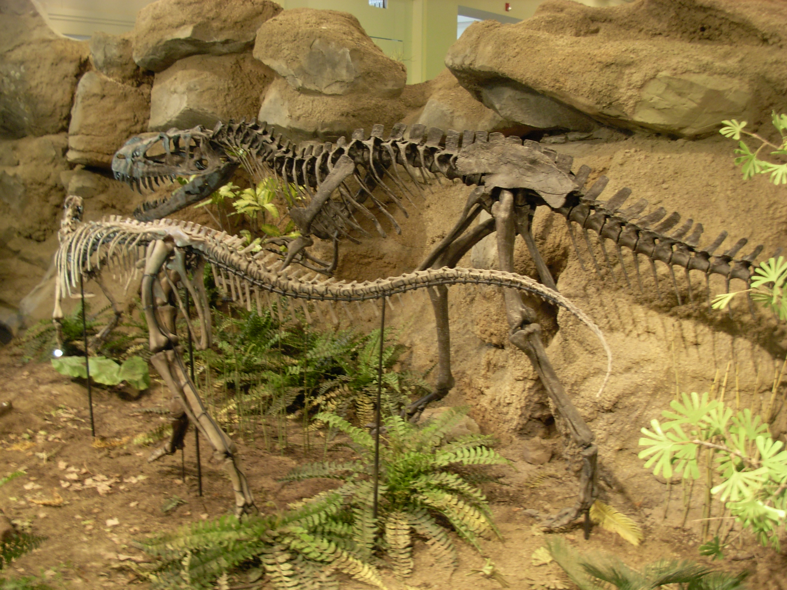 Dryosaurus altus and Ceratosarus nasicornis